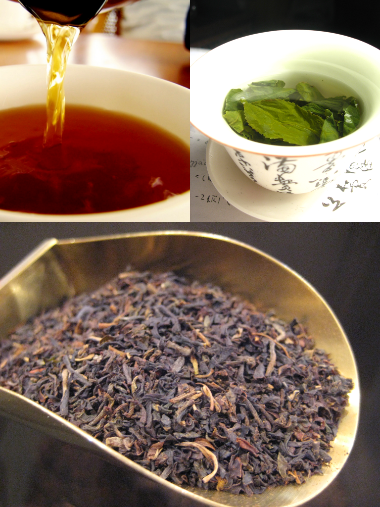 Té